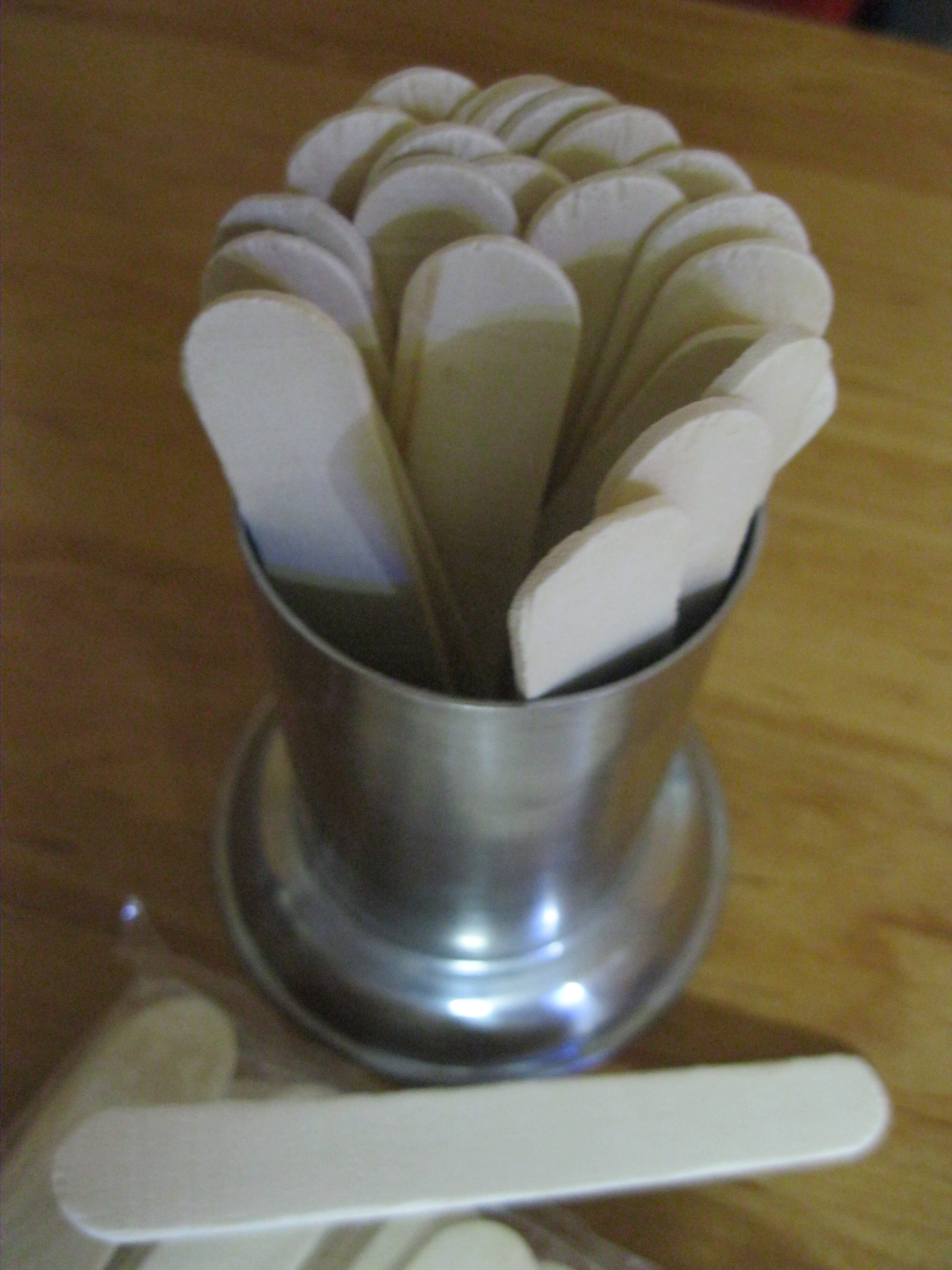 ابزار ساده معاینه